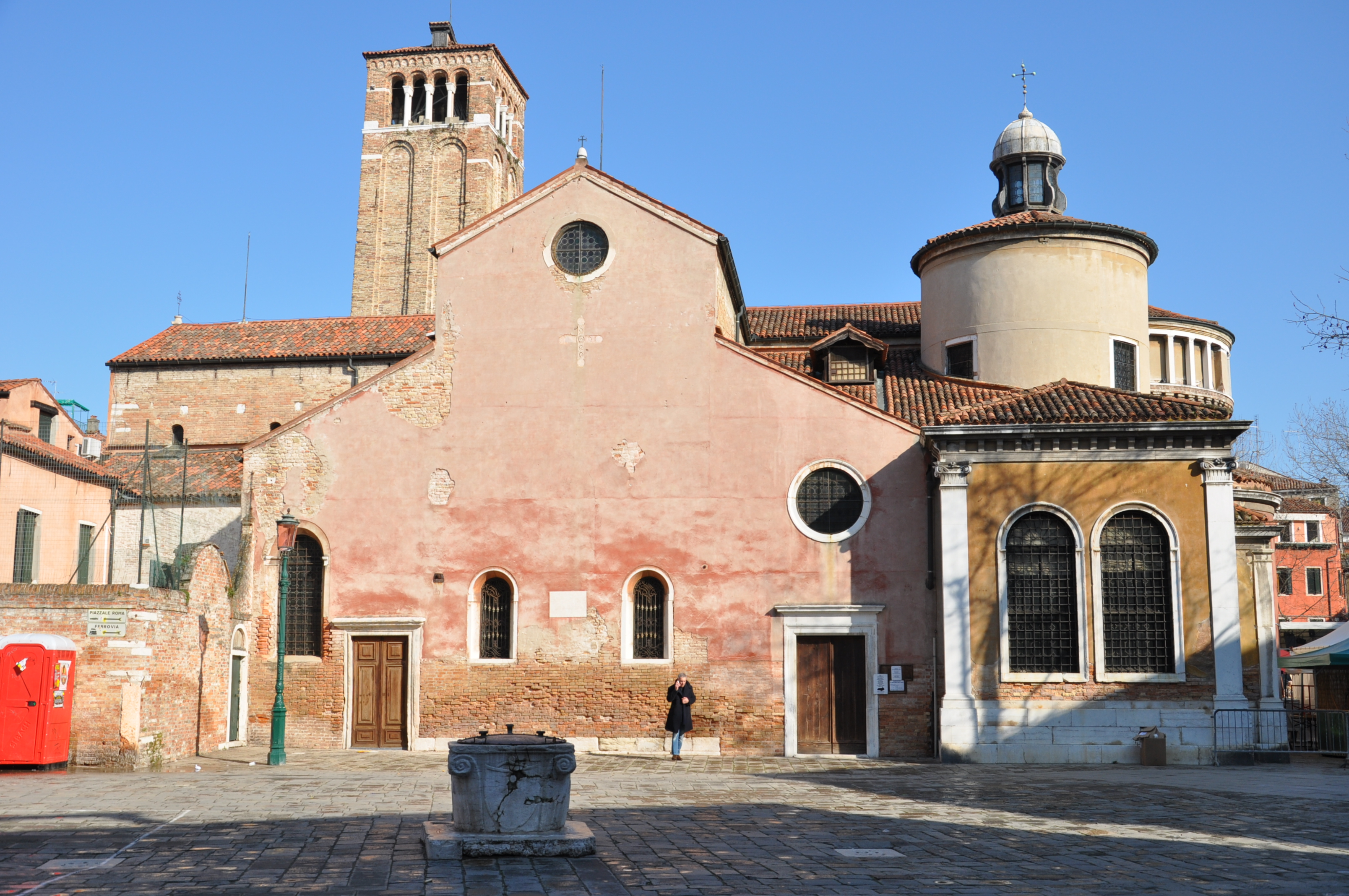 Una delle più antiche Chiese di Venezia; con il soffitto a scheletro di nave